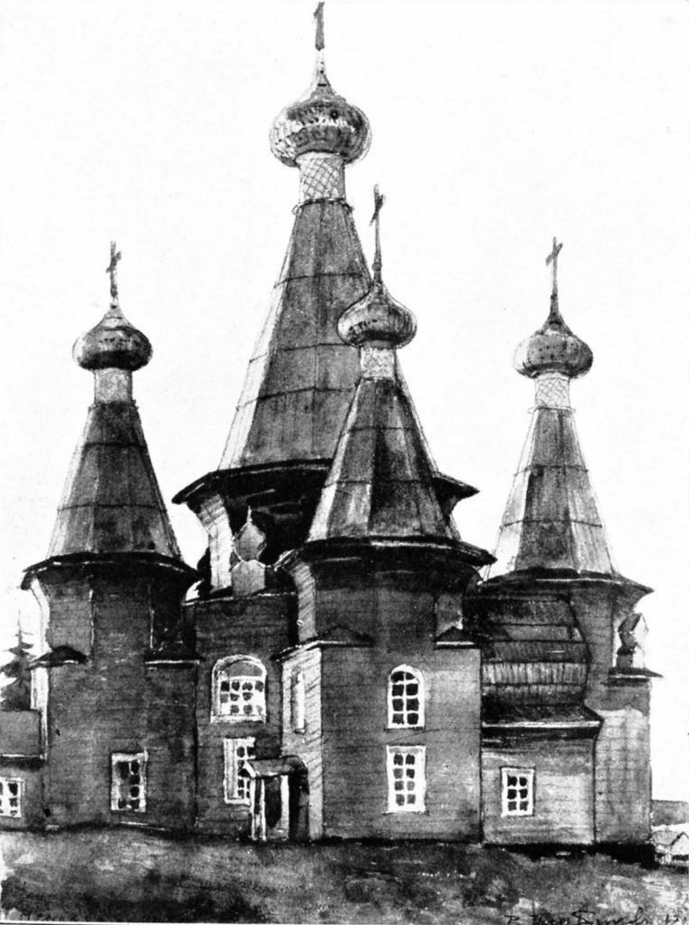 Троицкая церковь деревни Нёнокса Архангельской губернии.